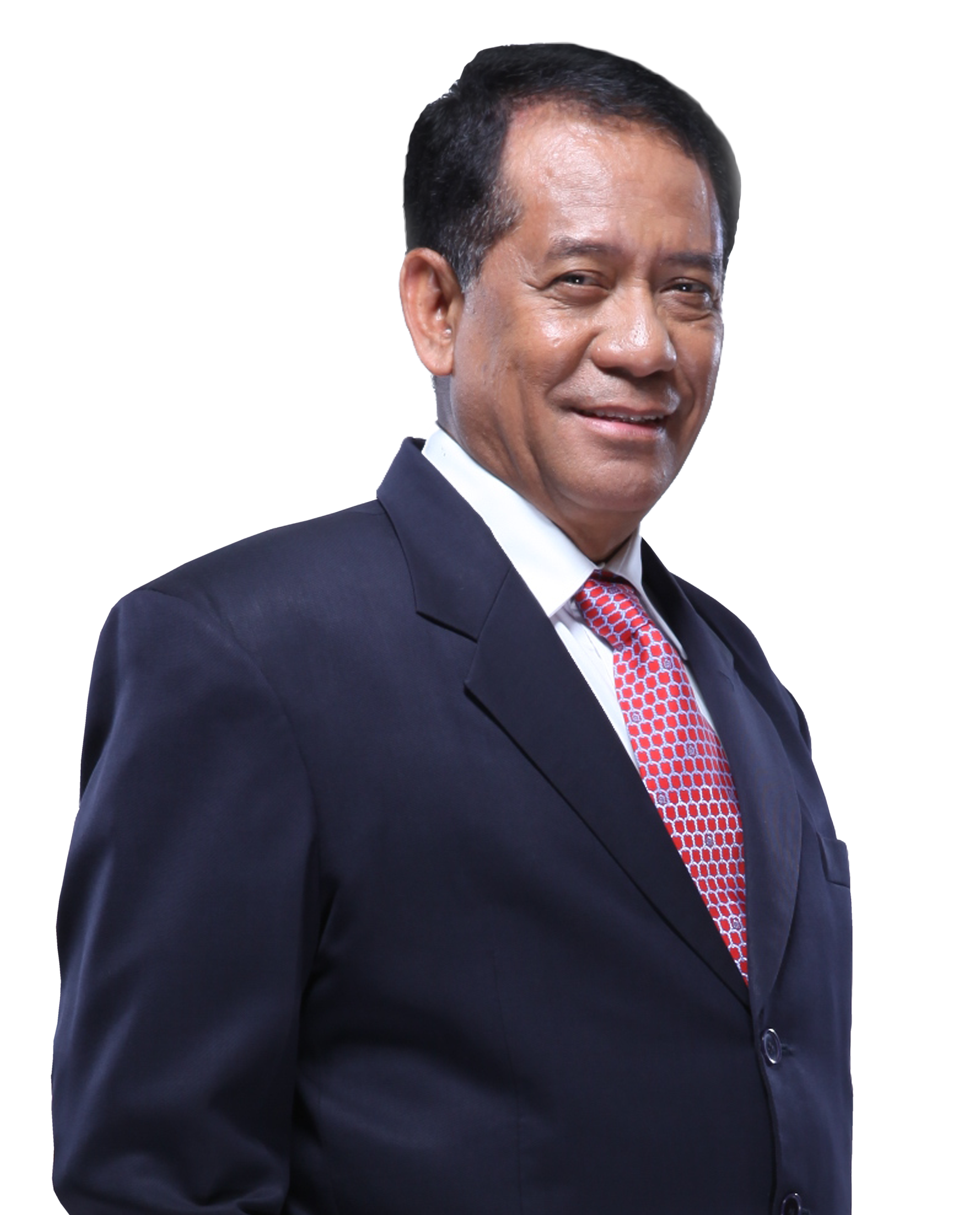 Laode Masihu Kamaluddin